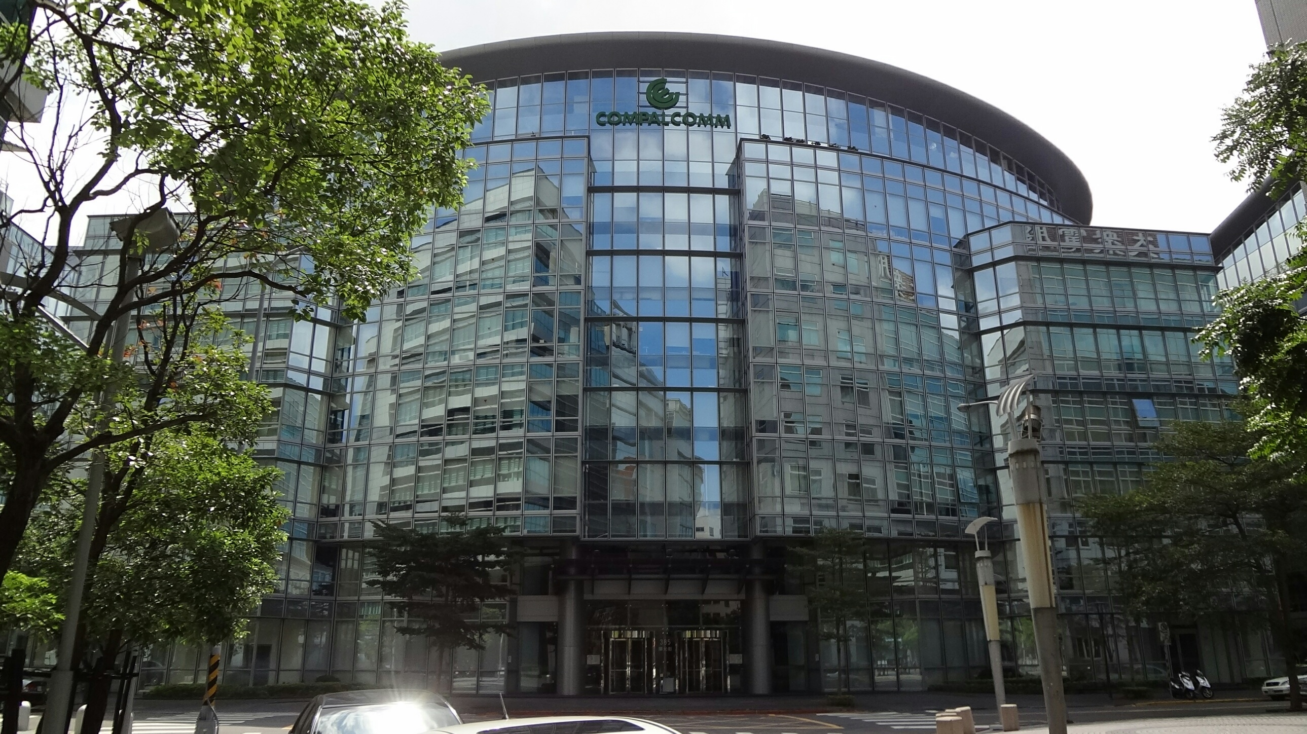 華寶通訊總部，地址：臺北市內湖區陽光街385號。